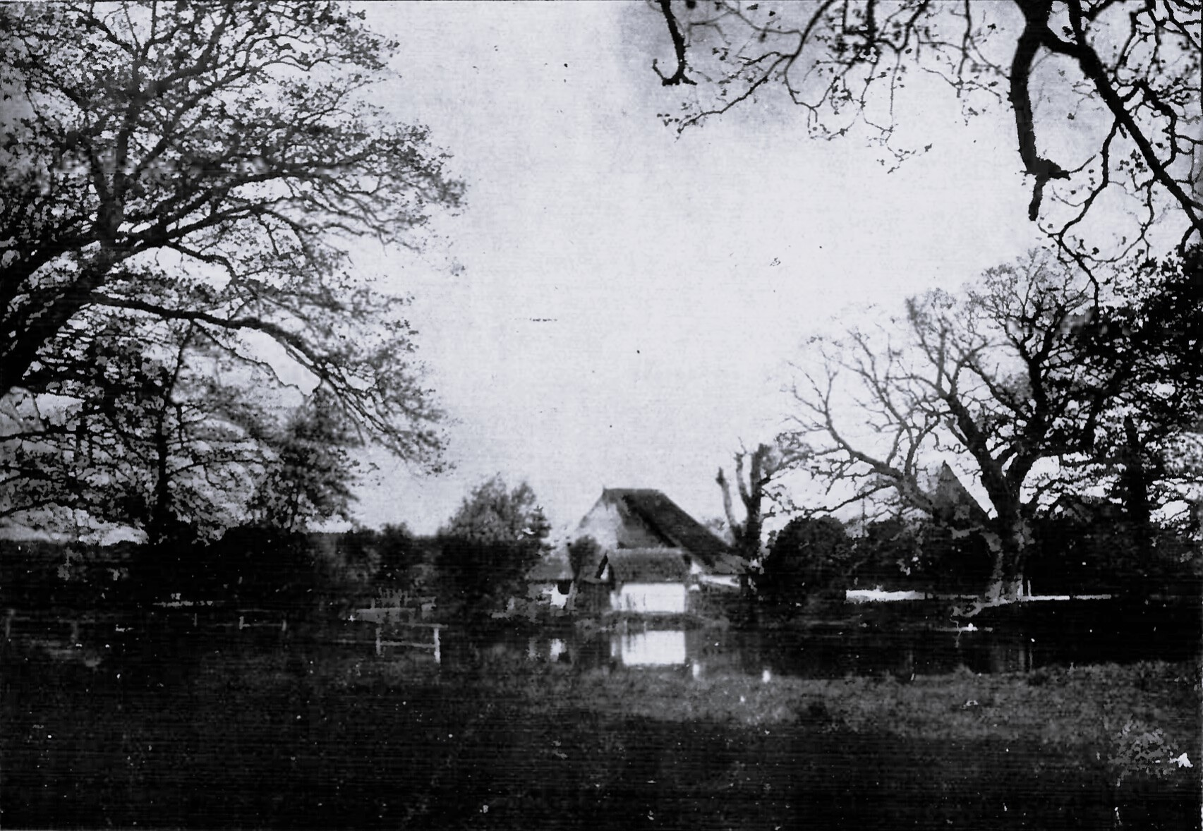 Blick vom Nordrand des Kleinen Hasselbruchs auf den Hirtenteich im Gebiet der Israelsdorfer Endmoräne.